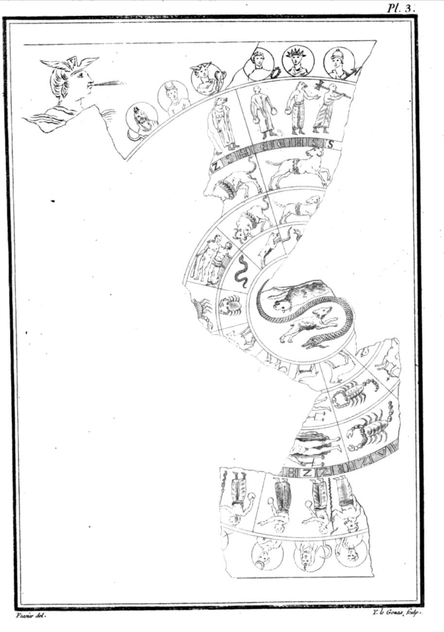 Зодиак (planisphaerium), найденный в 1705 году на холме Авентин в Риме и подаренный французской академии Франческо Бьанкини (Francesco Bianchini, 1669-1729), ныне хранится в Лувре.